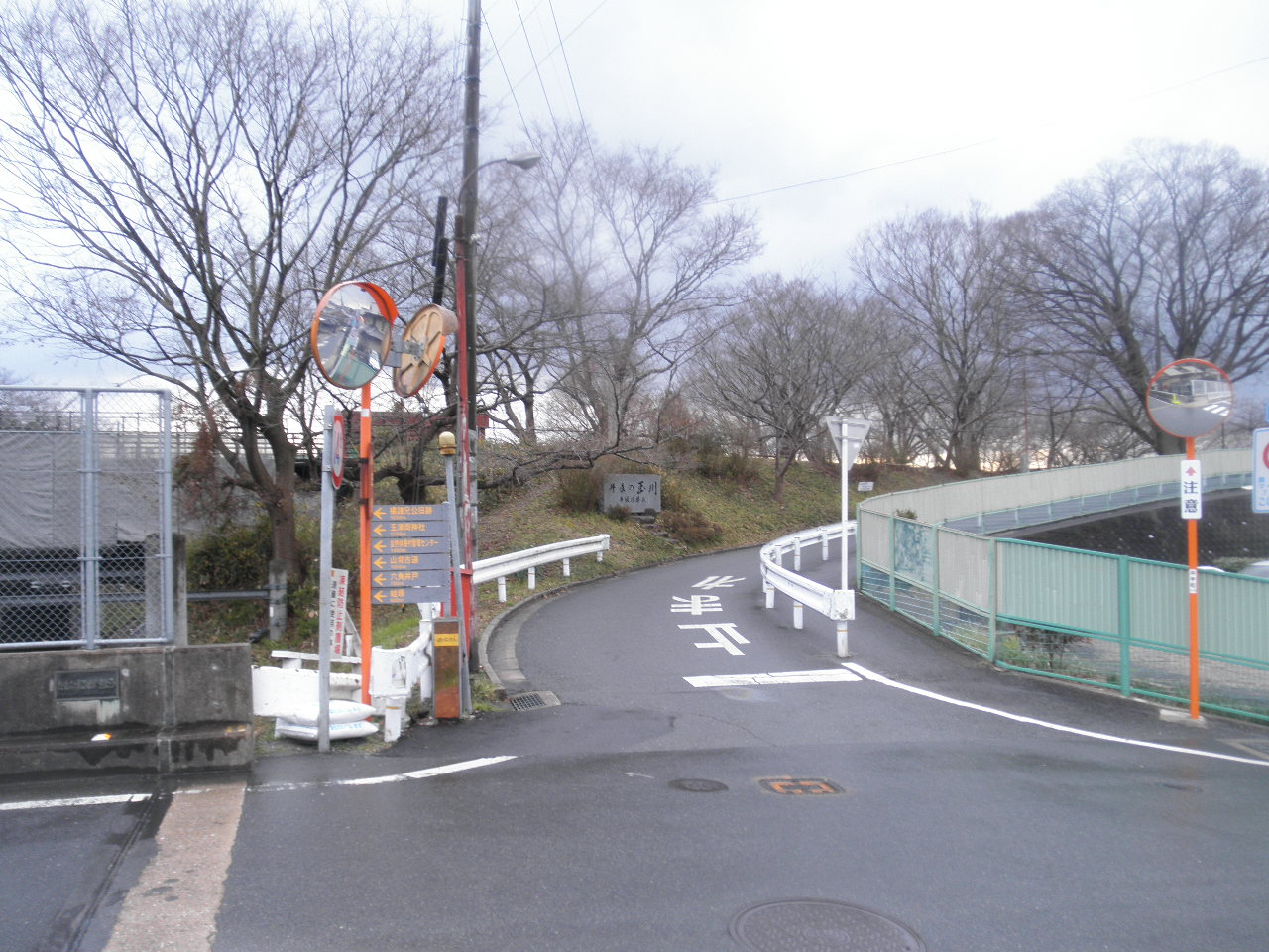 京都府綴喜郡井手町井手柏原